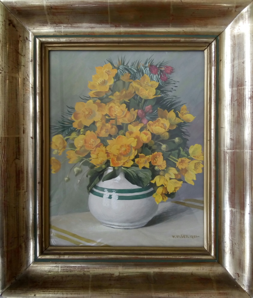 X